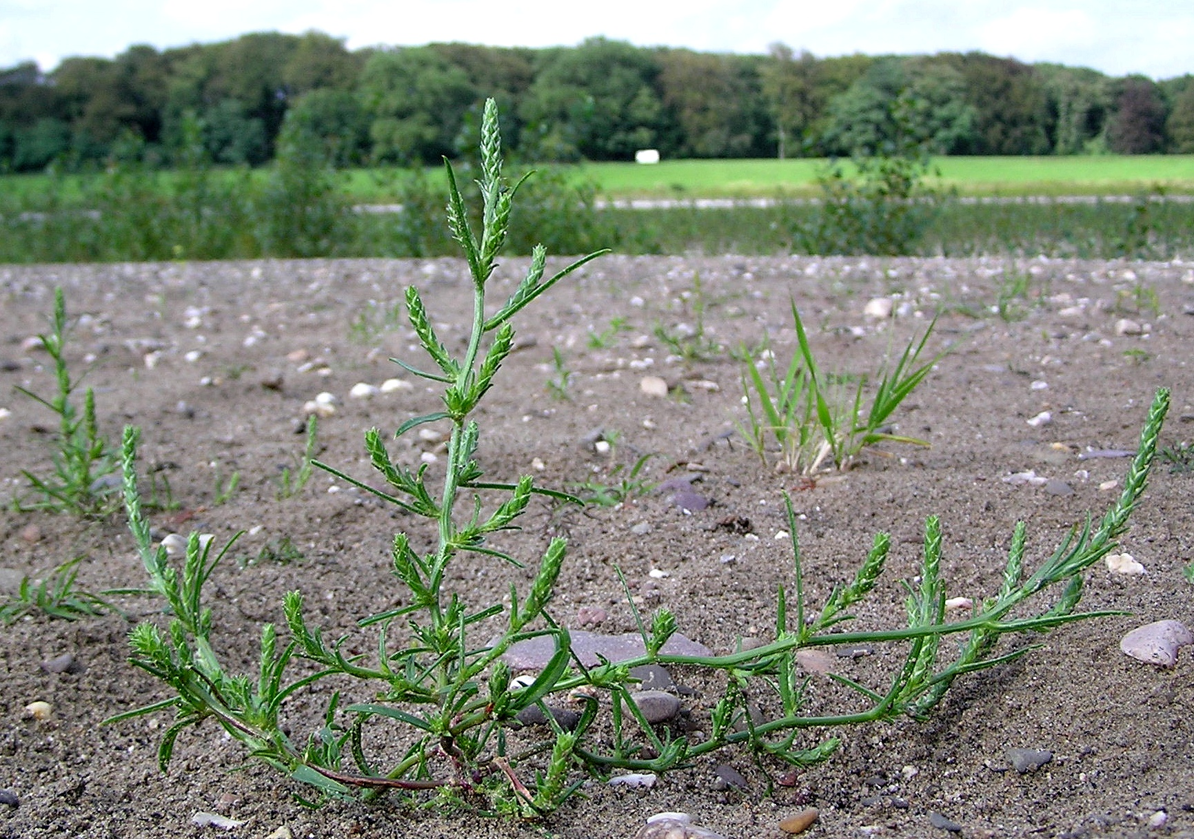 Corispermum intermedium